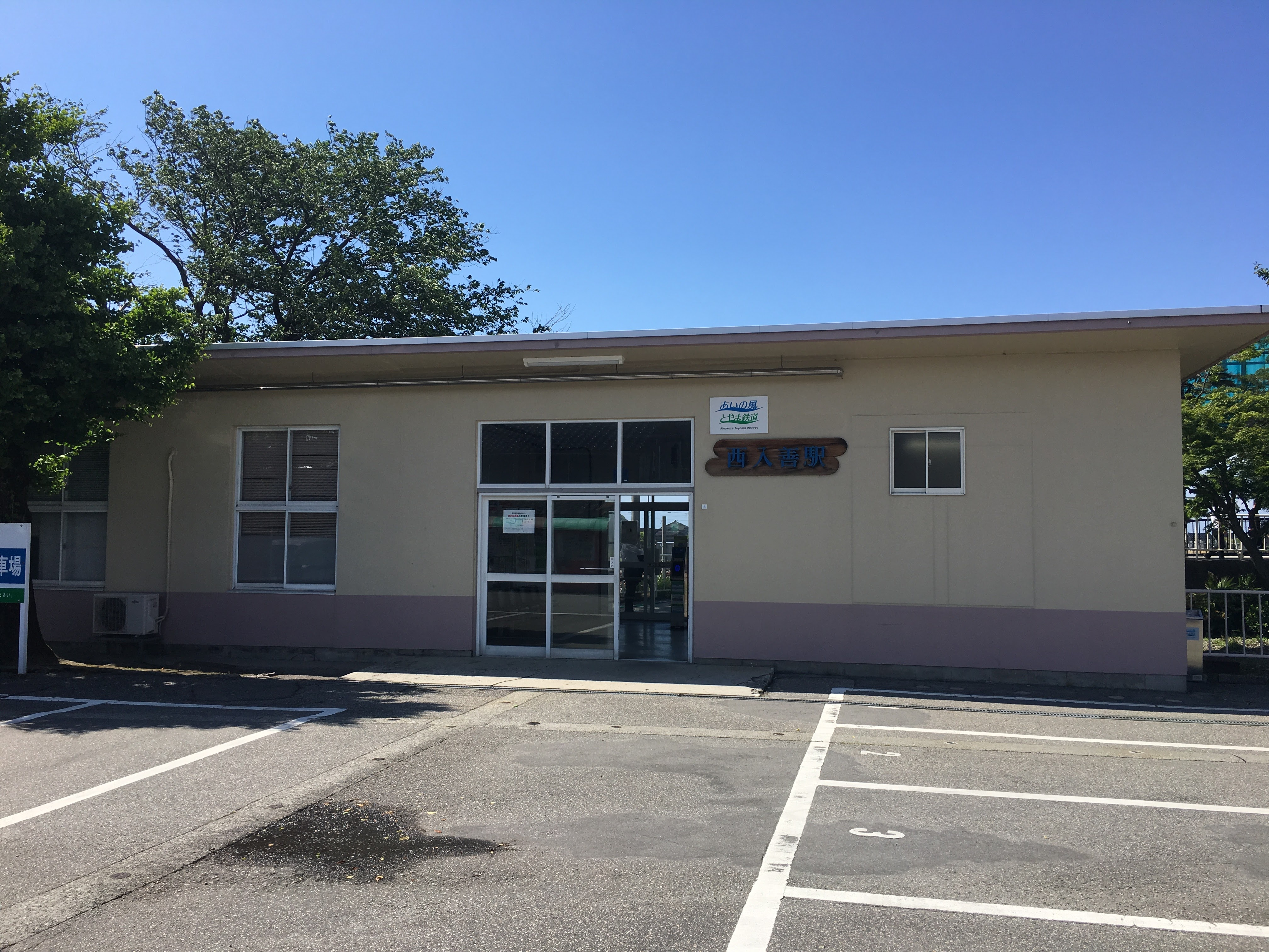 西入善駅駅舎